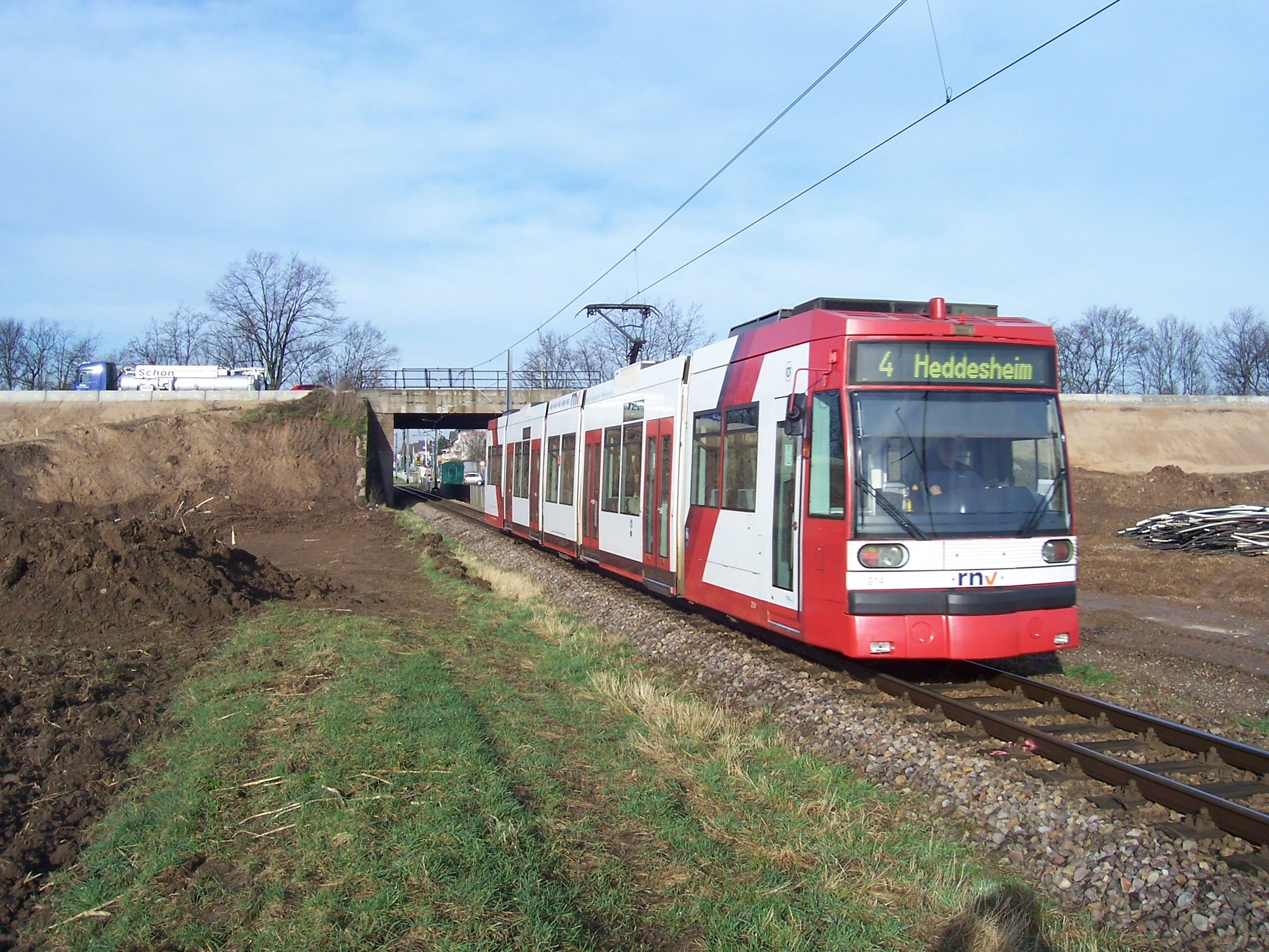 Eine Straßenbahn zwischen Mannheim-Wallstadt und Heddesheim bei der Unterführung der Autobahn 6.